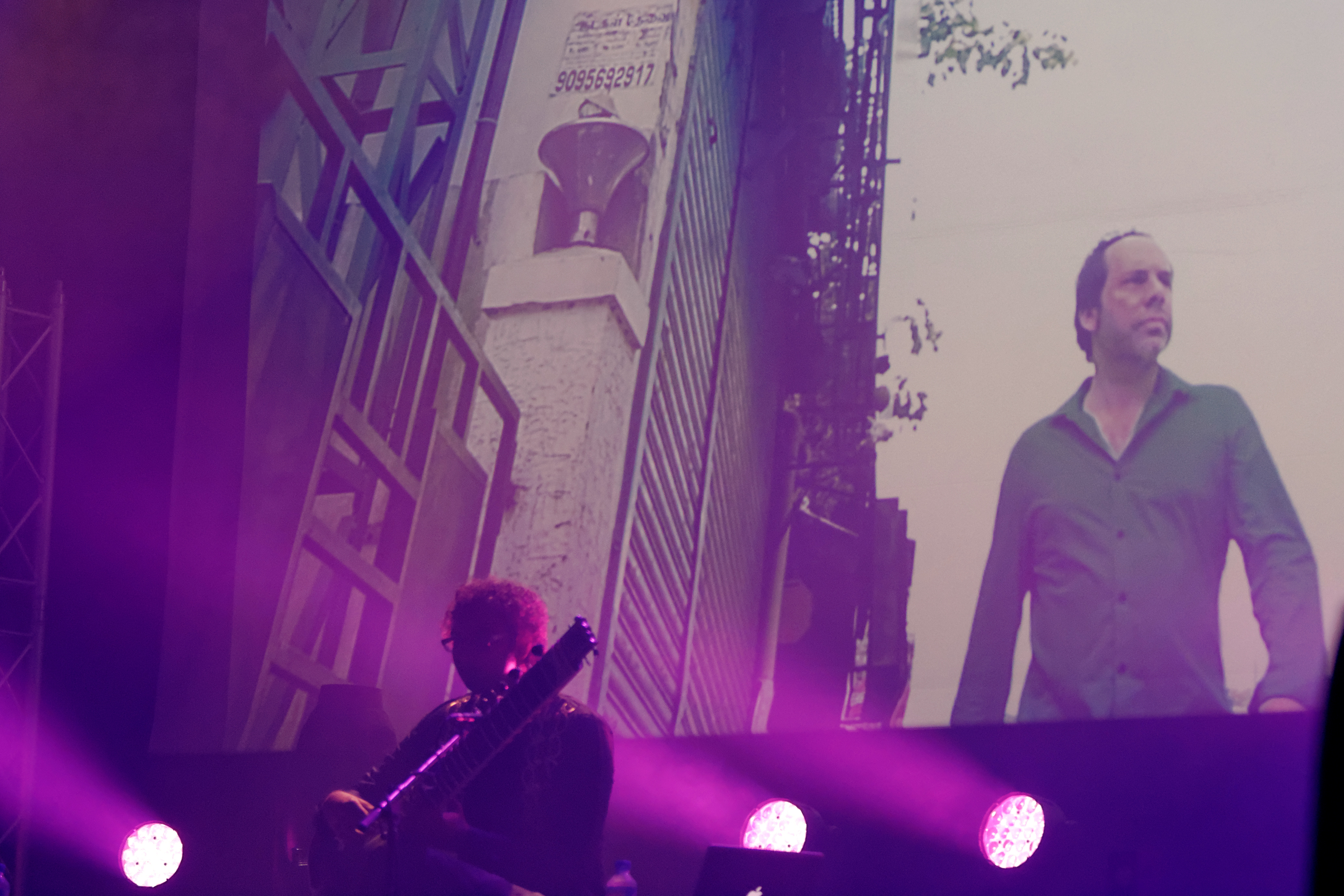 Olli and the Bollywood Orchestra en concert à l'espace Gradlon lors du festival de Cornouaille le 23 juillet 2014.